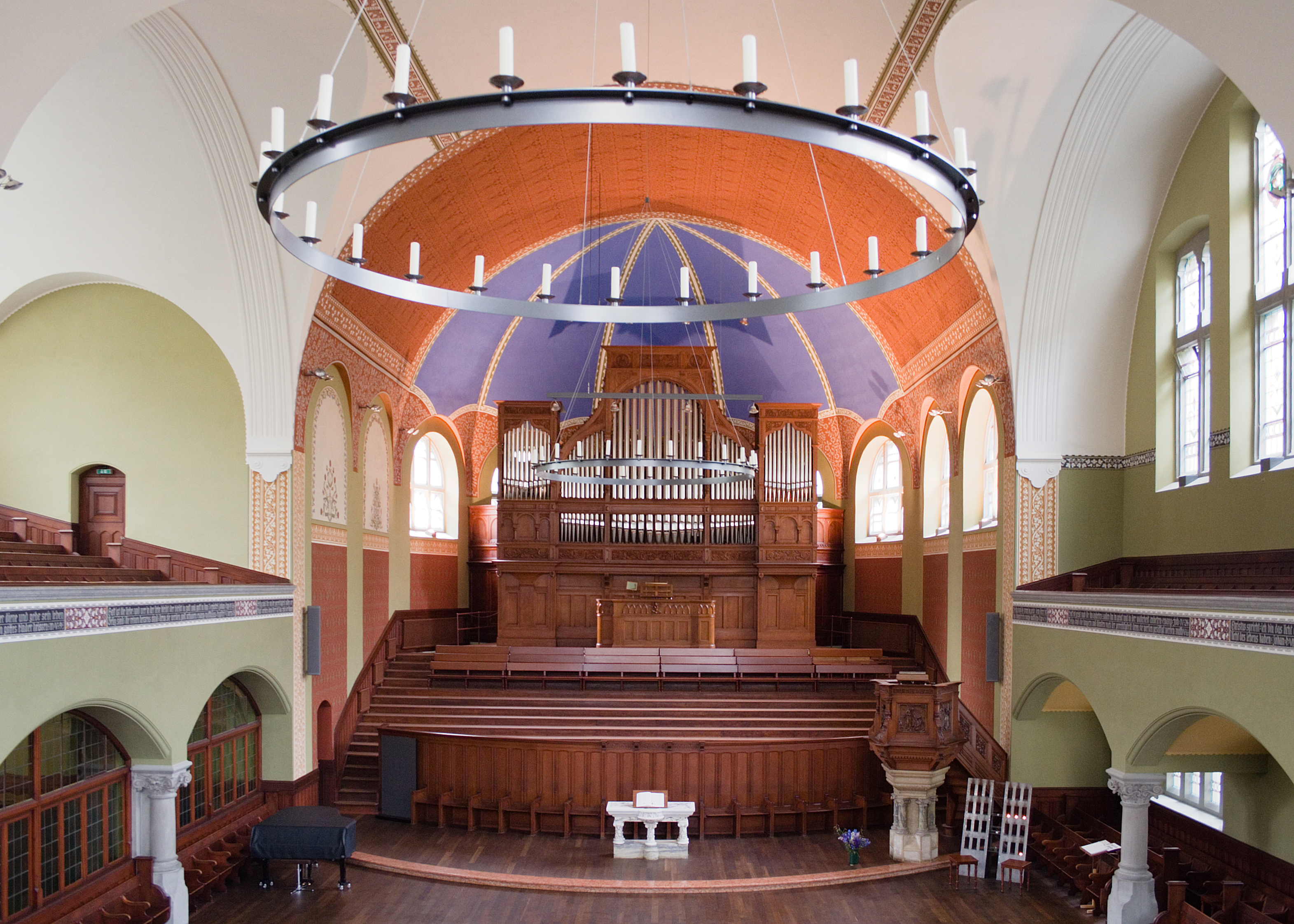 Innenansicht der St. Jakobskirche am Stauffacher in Zürich, Schweiz